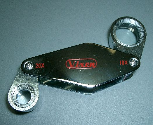 loupe